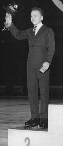 Factual corrections and alternative descriptions are encouraged separately from the original description. Additionally errors can be reported at this page to inform the Bundesarchiv. Original historic description: Günter Zöller, Nepela, Kurembin Zentralbild CTK 5.12.1964 Einen hervorragenden zweiten Platz belegte der DDR-Sportler Günter Zöller (auf unserem Foto rechts) bei dem internationalen Eiskunstlaufwettbewerb um den "Goldenen Schlittschuh" in Prag. Den ersten Platz belegte Nepela (CSSR) und auf Platz drei kam der sowjetische Sportler Kurembin. Original zu Telefoto C1205-07-1N